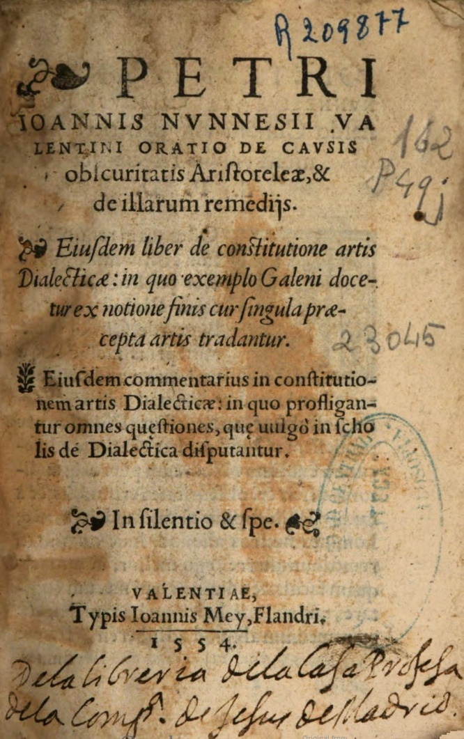 Portada de l'obra "Oratio de causis obscuritatis Aristoteleae, & de illarum remedijs ; Eiusdem liber de constitutione artis Dialecticae ... ; Eiusdem commentarius in constitutionem artis Dialecticae" de Pere Joan Nunyes. Valentiae : Typis Ioannis Mey, Flandri, 1554.